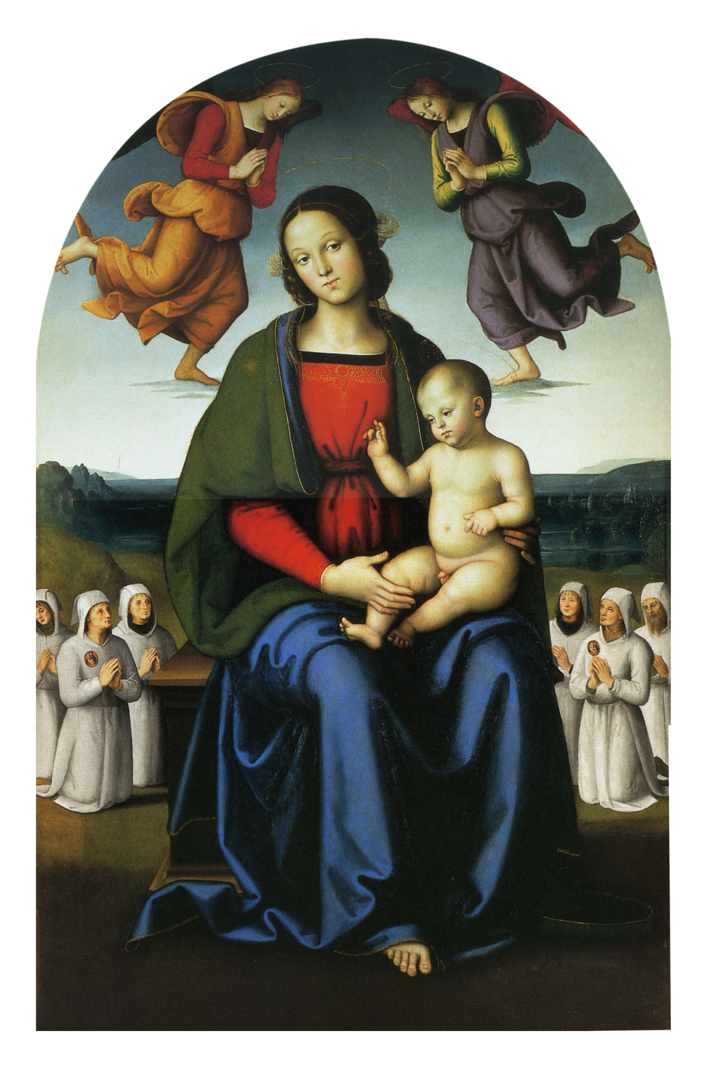 Pietro Perugino: Madonna della Consolazione. Cat. no. 50 in Vittoria Garibaldi: Perugino. Catalogo completo. Octavo, Firenze 2000, ISBN 88-8030-091-1